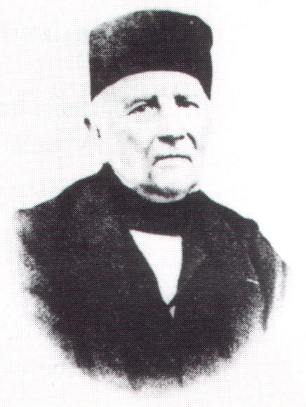 Daniël David Büchler (1787 - 1881), architect